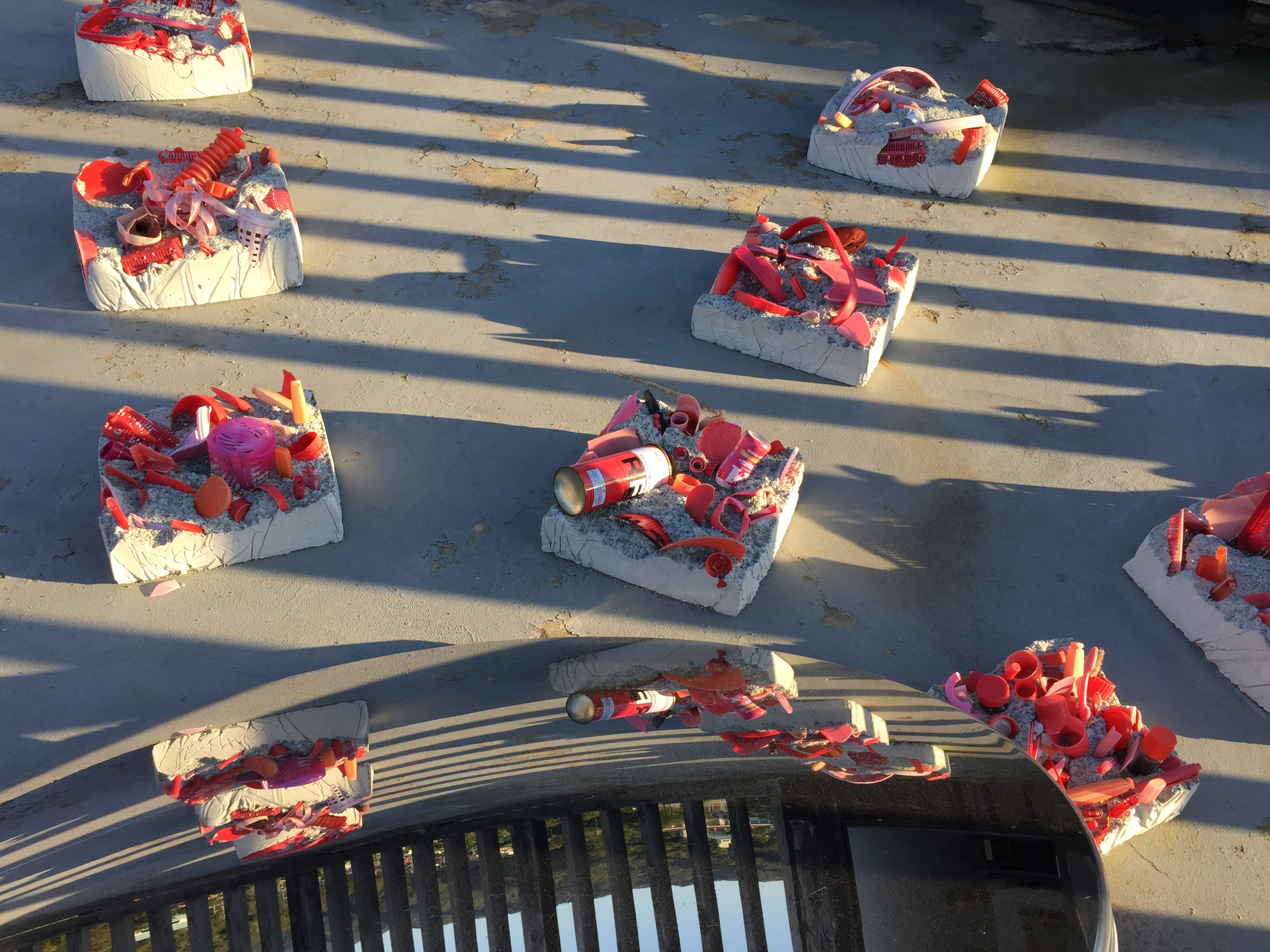 京丹後市網野町の夕日ケ浦海岸でビーチコーミングをして、赤色の漂着物ばかりを集めて、コンクリートで固め、華が咲いたようにヒカリ美術館の屋上に並べたもの。丹後の「丹」の丹色にちなんだ作品である。２０１５年９月２０日～１０月１２日の「大地は器２０１５」に展示され、２０１８年まで展示されていた。